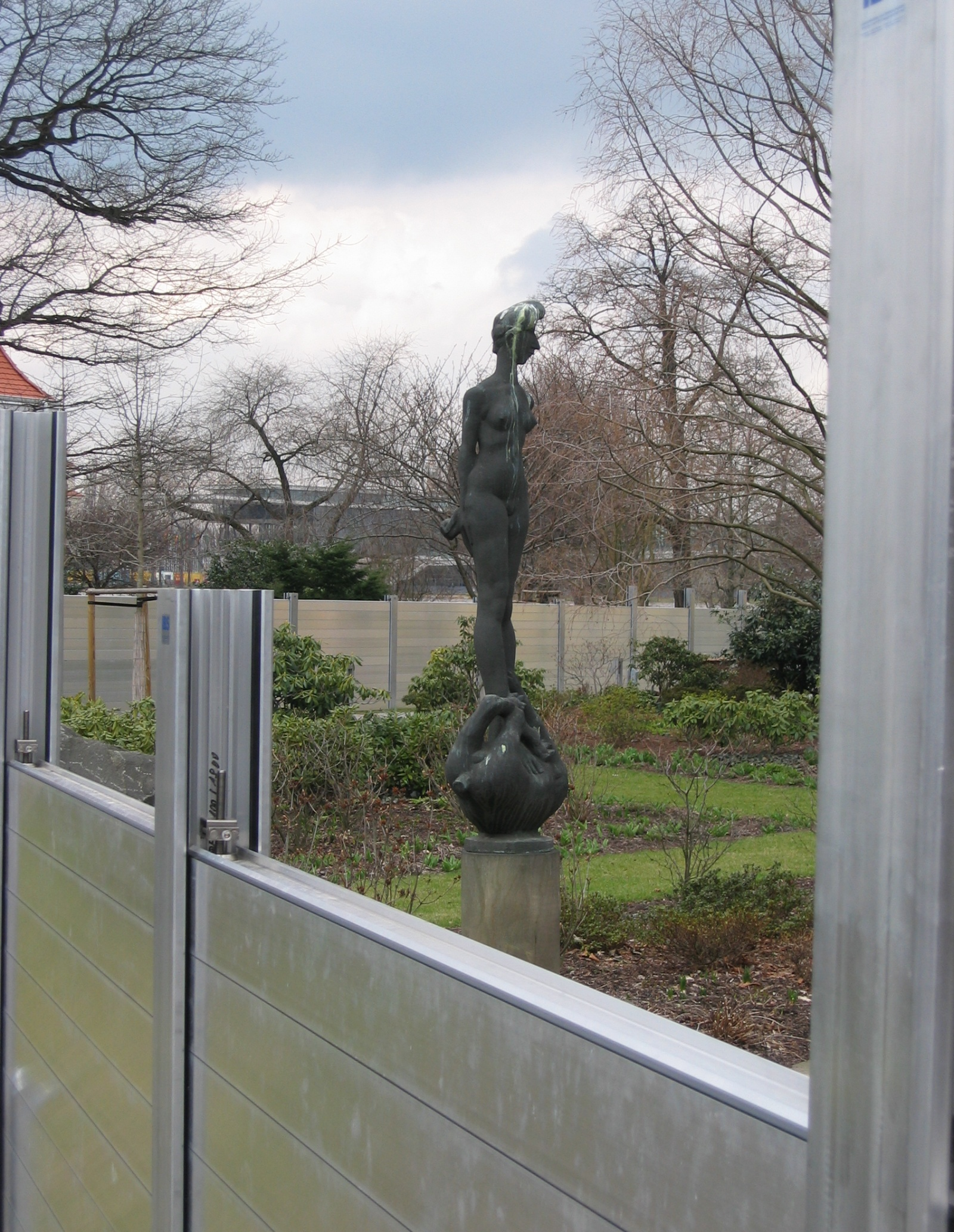 Hochwasserschutzanlage Hotel Bellevue Gartenanlage elbseitig, zu sehen ist die Plastik "Die Schöne und das Tier" von Detlef Reinemer